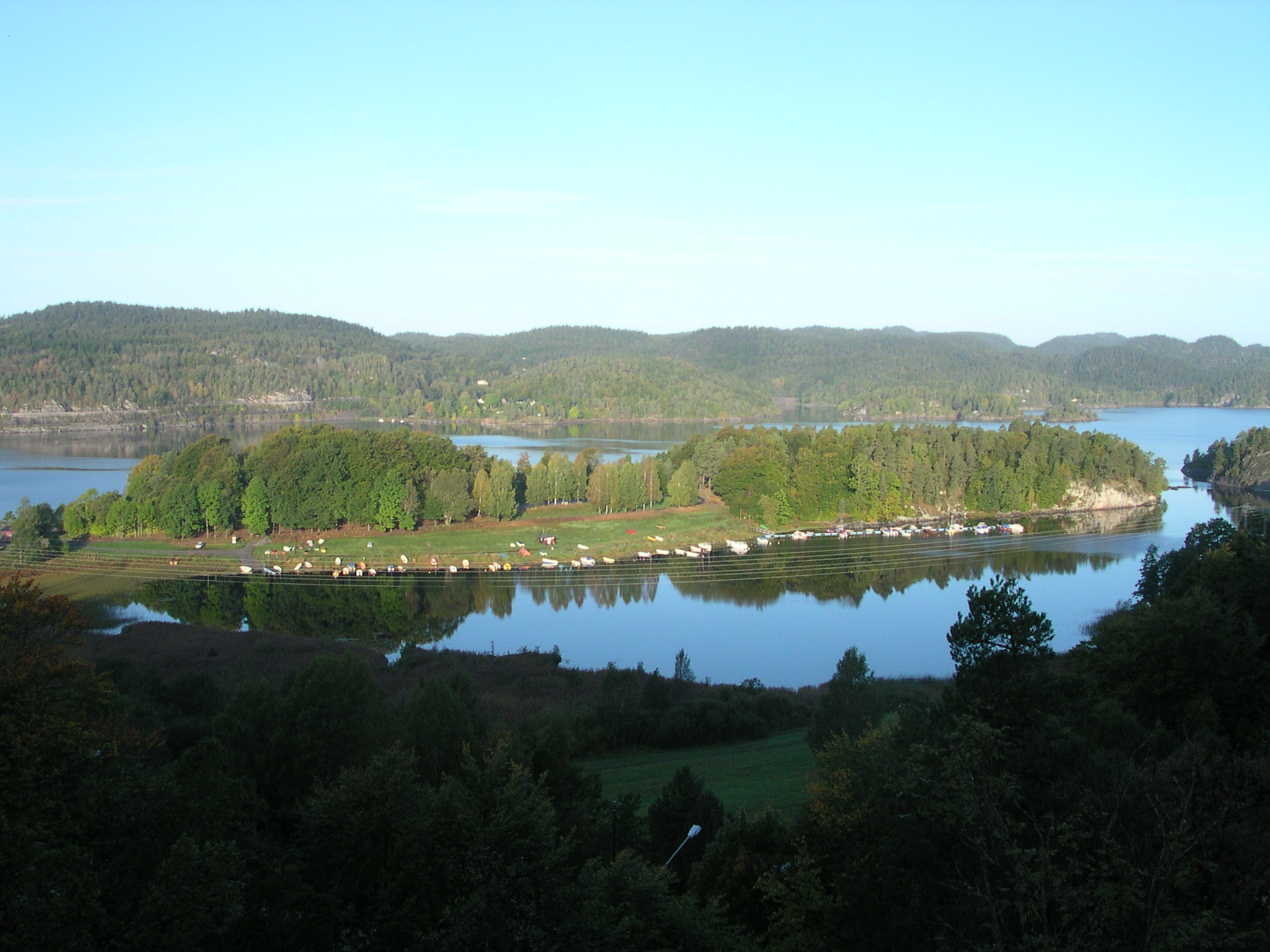 Jomfruhalvøya ved Farriskilen i Larvik